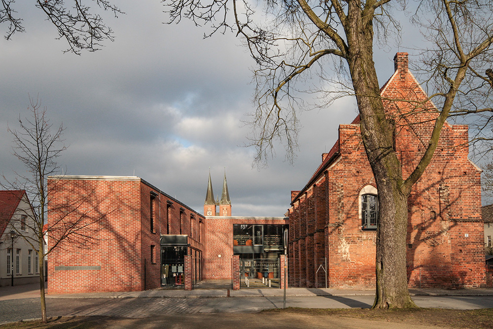 Stendal Mönchskirchhof 1, Stadtbibliothek Stendal, links der Neubau rechts der Altbau, das Refektorium